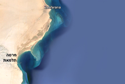 החוף המצרי זעפרנה ומרסה תלמאת